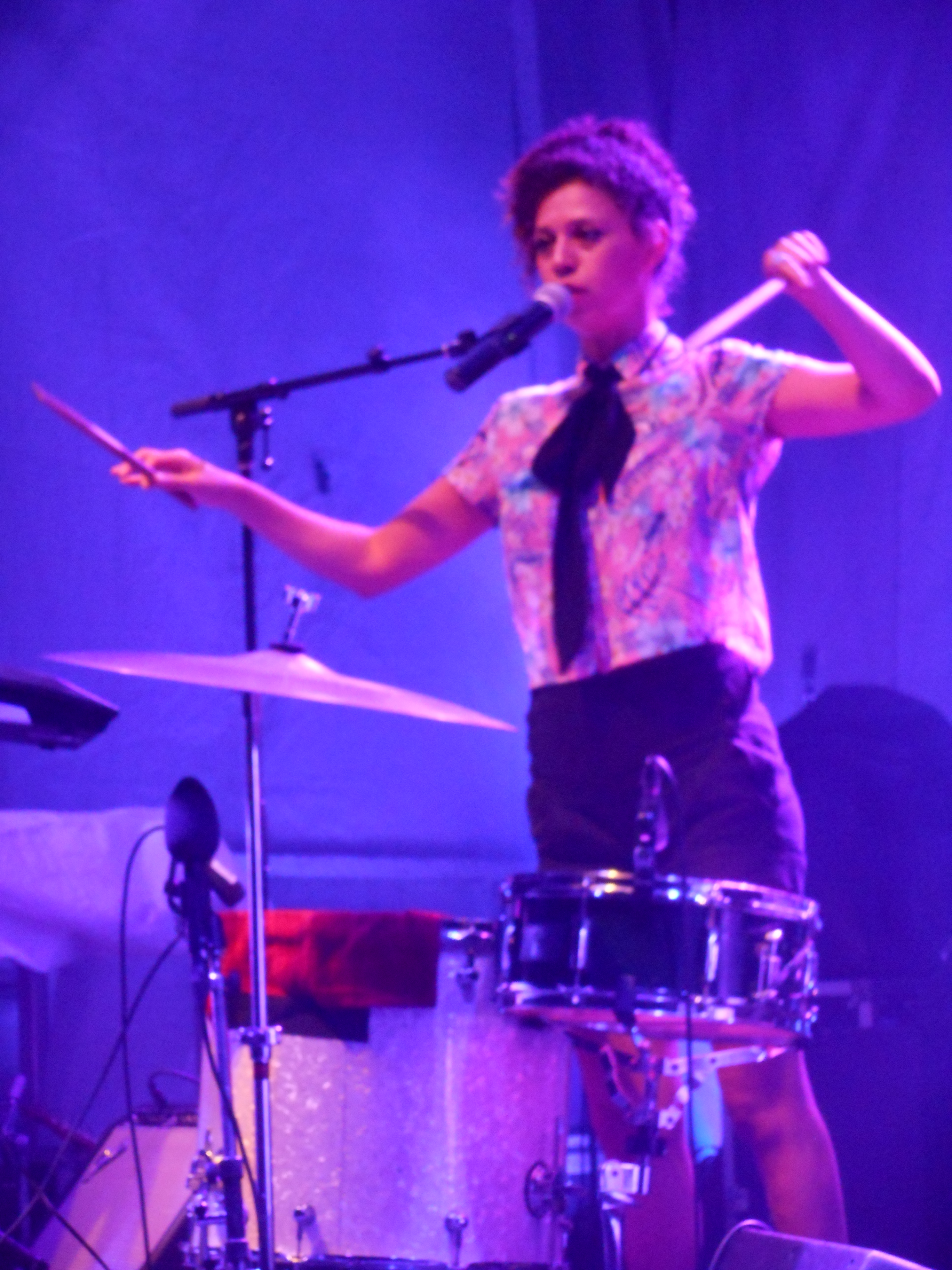 Spectacle de La Bronze (Nadia Essadiqi), sur une scène extérieure, rue Saint-Denis, à Montréal, dans le cadre du festival Oumf, le 8 septembre 2016